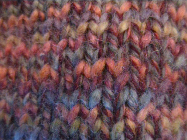 Stockinette stitch knitting